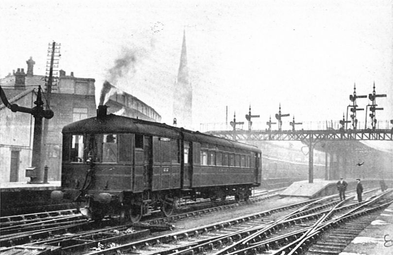 Sentinel-Cammell Steam Rail-Car, LNER Photo: LNER